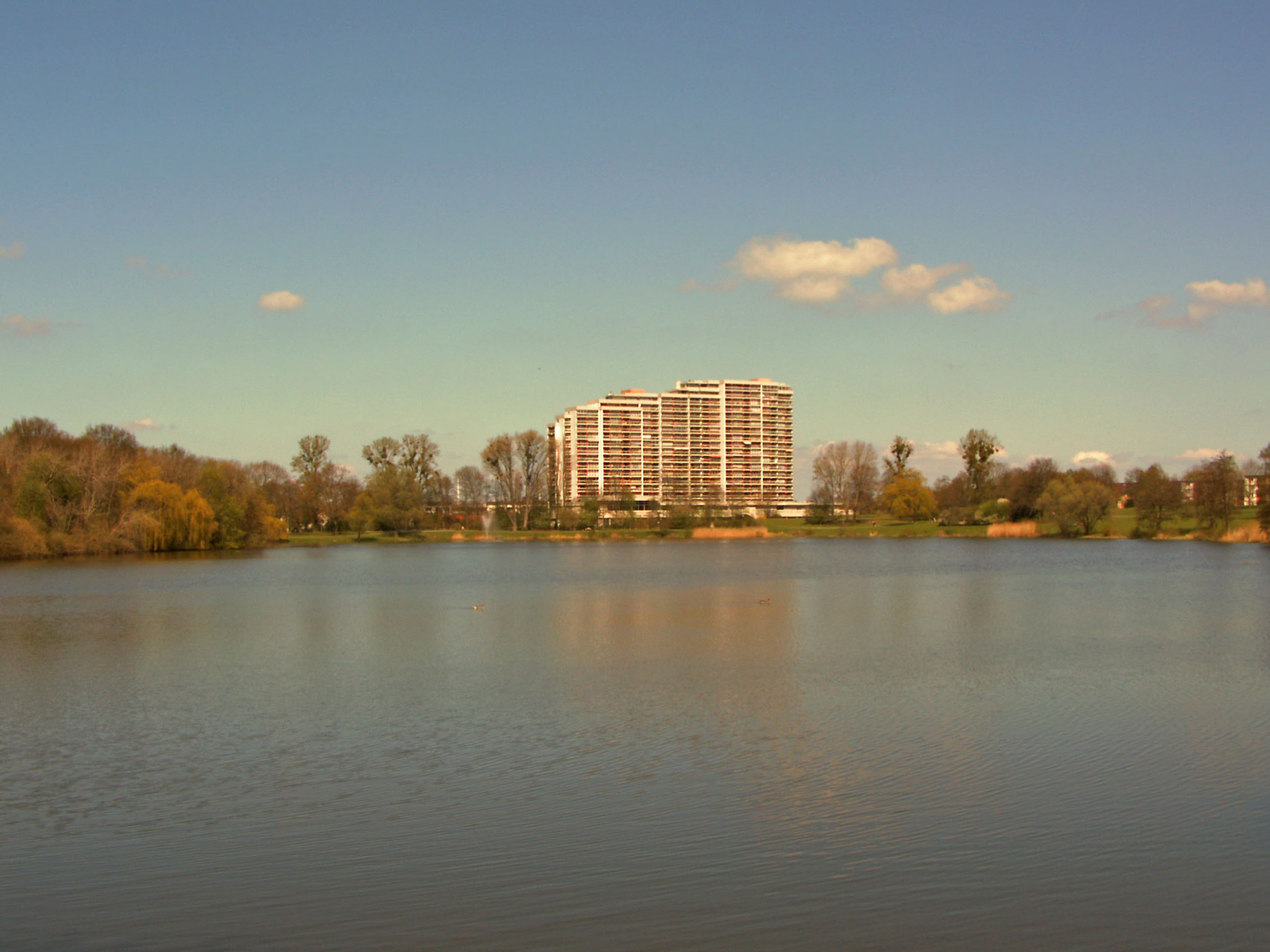 Grosser Schillerteich in Wolfsburg, im Hintergrund Schillerteich-Center